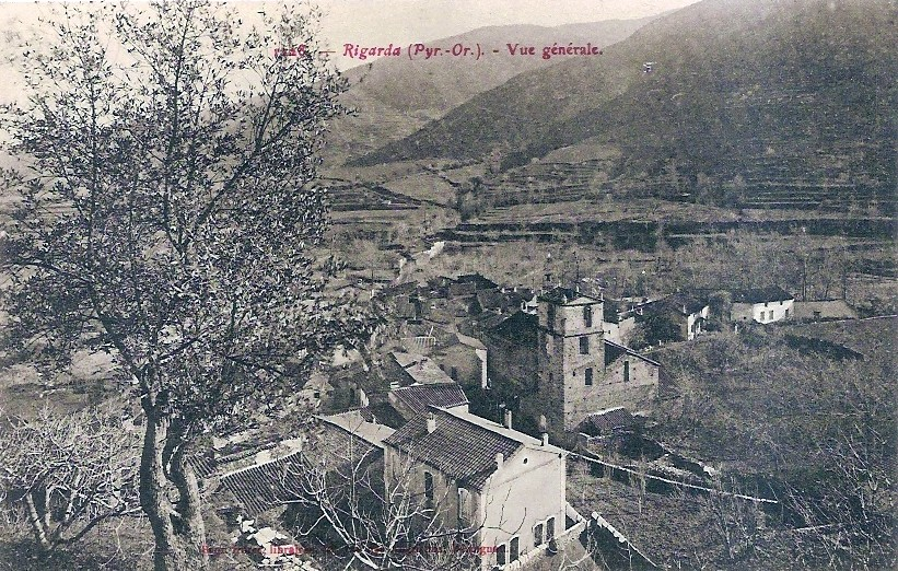 Vue générale de Rigarda